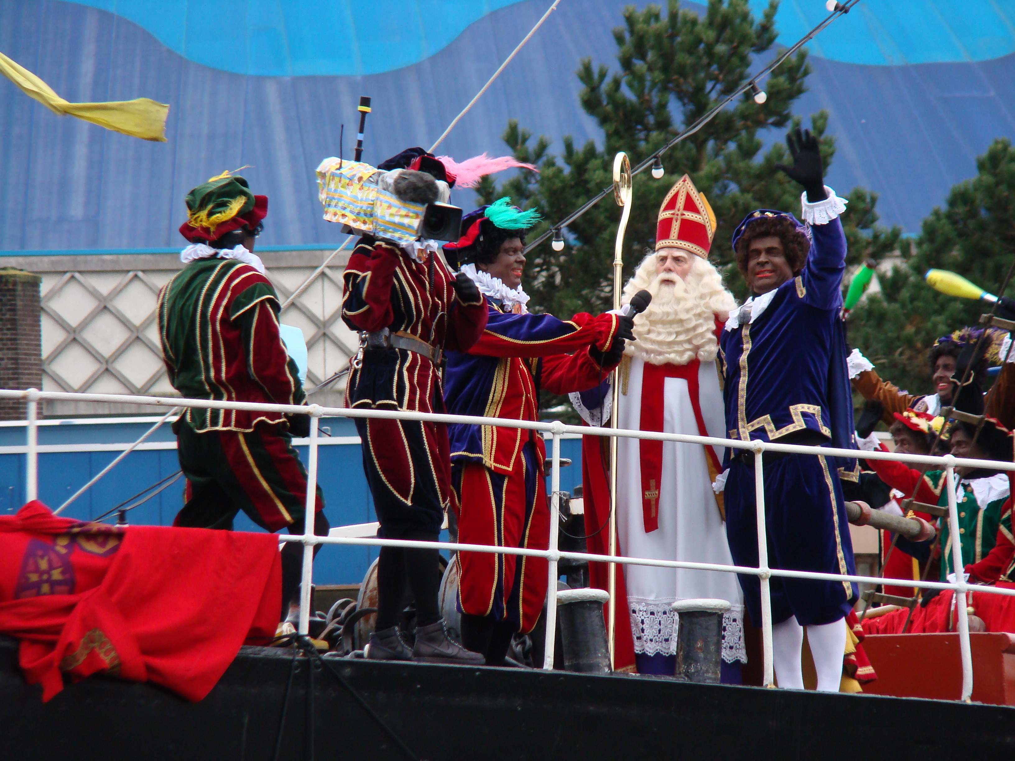 Sinterklaas intocht Harderwijk, 2010